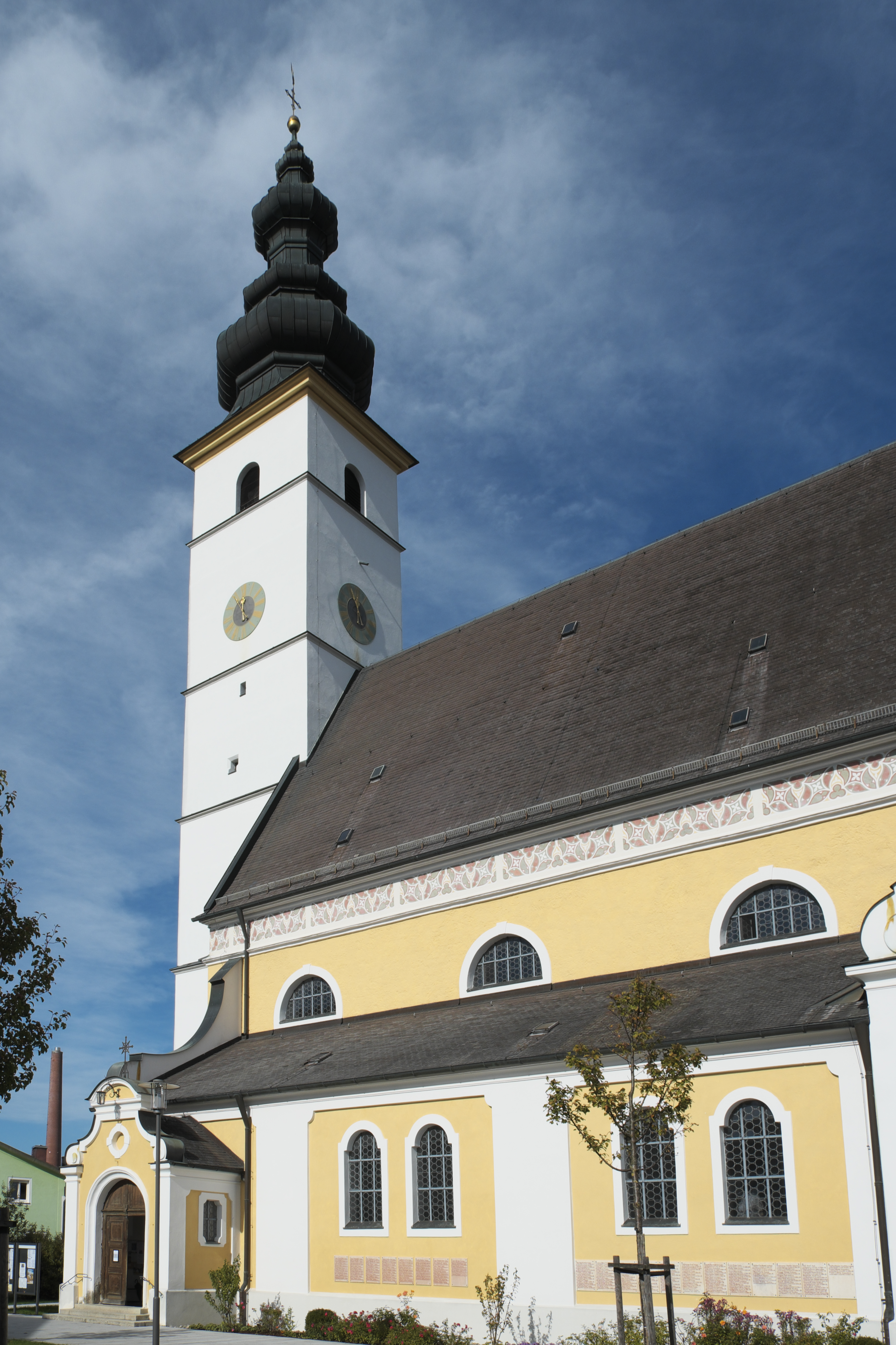 Katholische Pfarrkirche St. Martin in Waging am See im Landkreis Traunstein (Bayern/Deutschland)